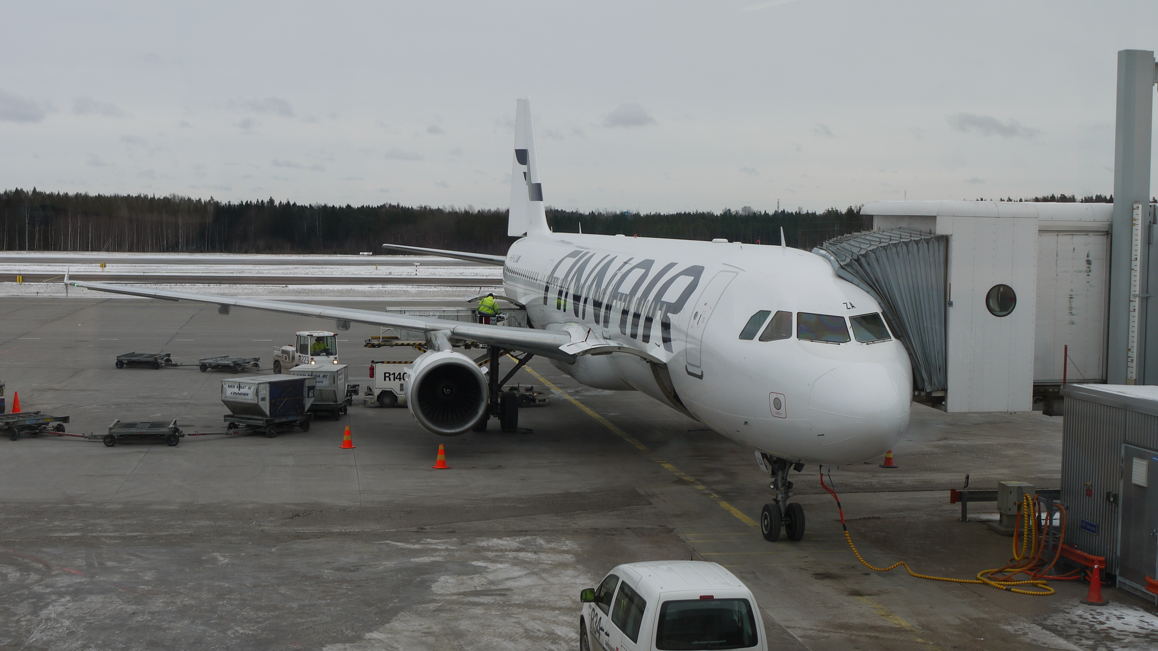 Finnairin Airbus A321 -matkustajakone OH-LZA Helsinki-Vantaan lentoasemalla helmikuussa 2017.